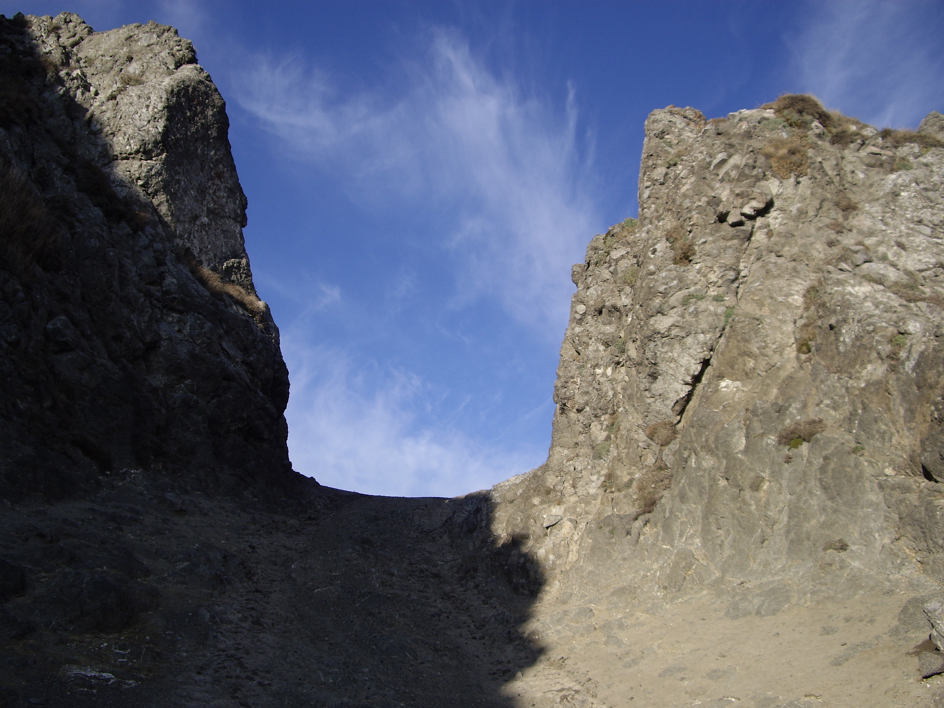 კლდეკარის ბუნებრივი კარი